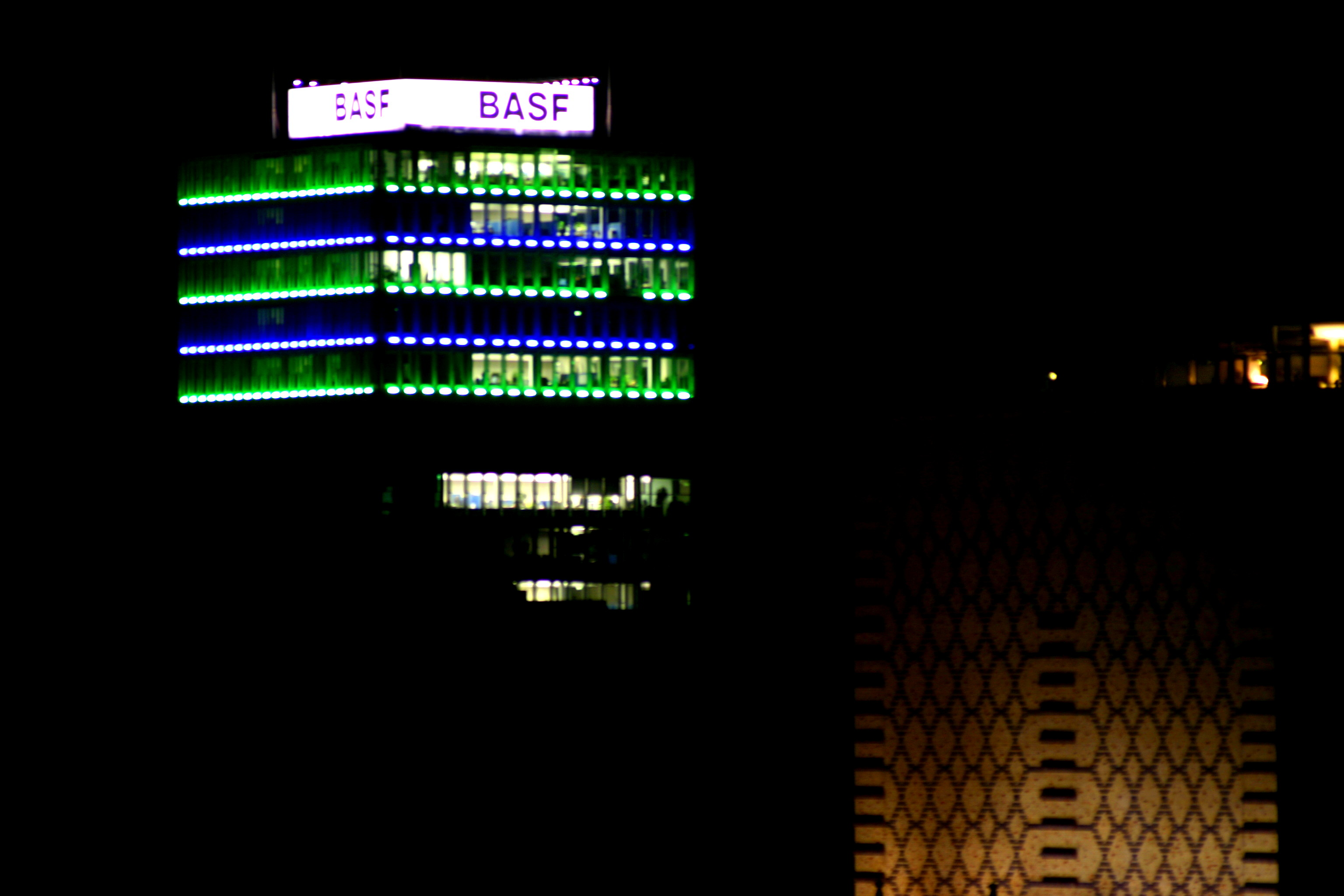 NARVA-Tower in Berlin-Friedrichshain at night